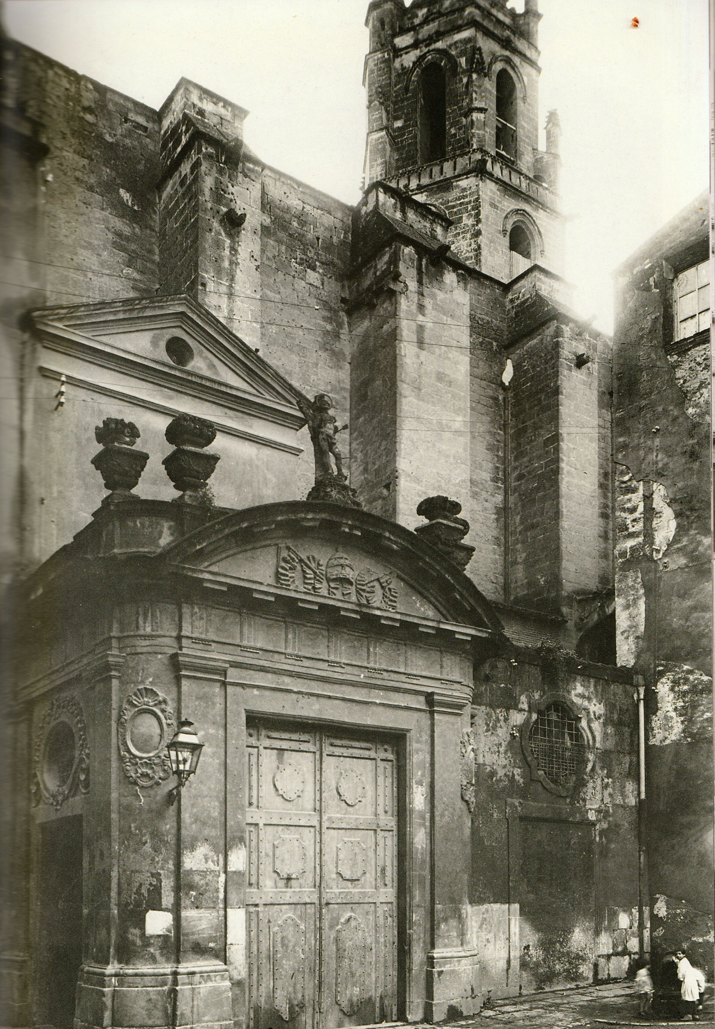 Portal barroc de sant Sebastià a la prioral de sant Pere de Reus